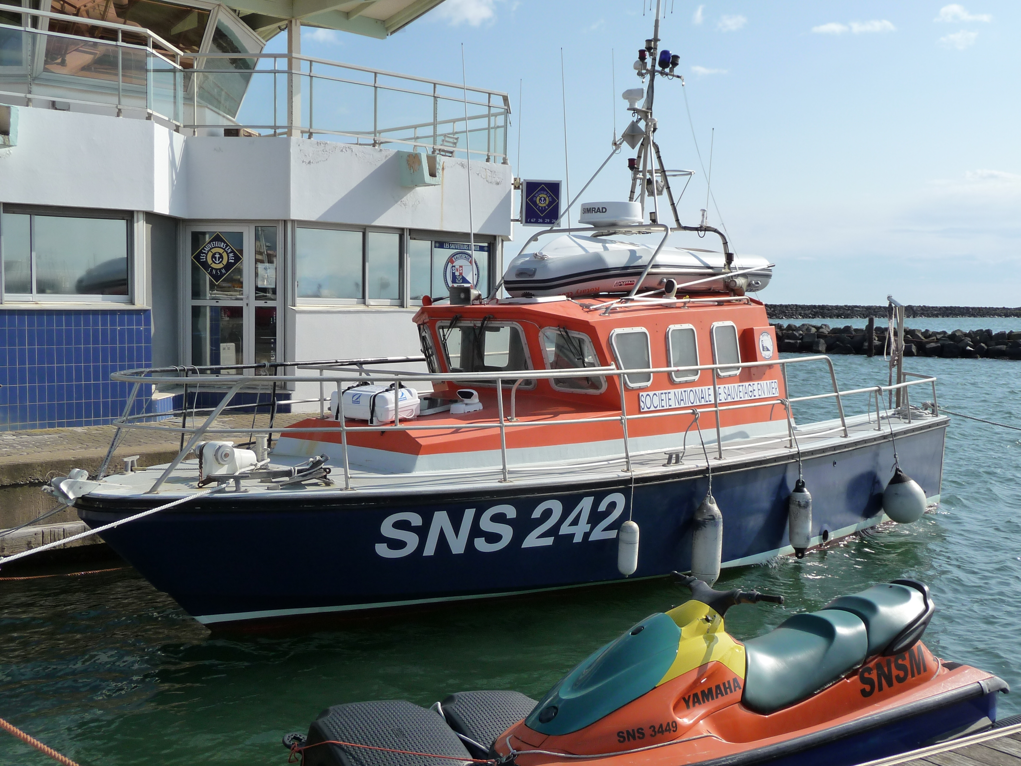 Vedette de sauvetage de 2e classe SNS 242 Capitaine de frégate Honoré d'Estienne d'Orves SNSM Le Cap d'Agde